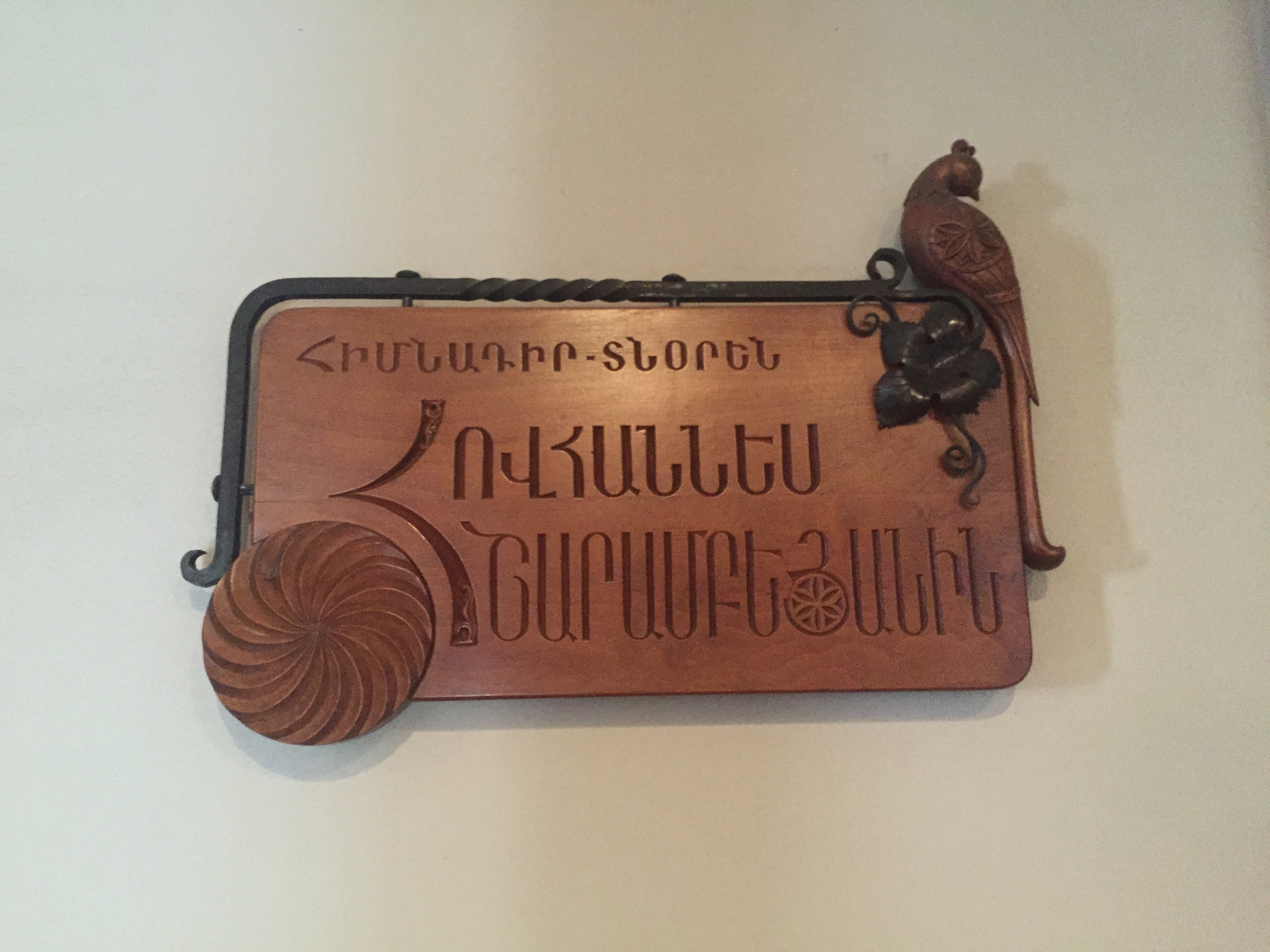 Հուշատախտակ Ժողովրդական արվեստի թանգարանում, Երևան, Հայաստան